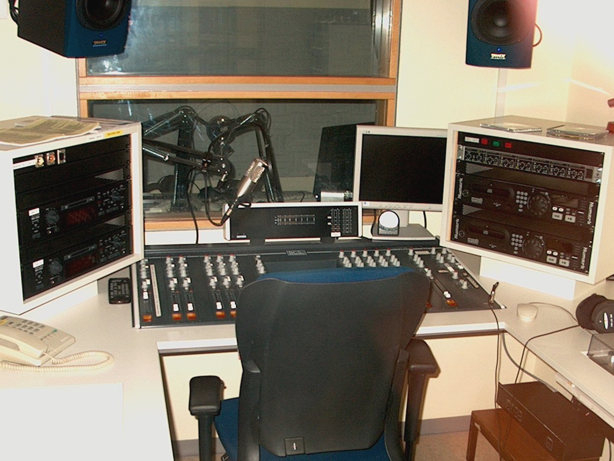 Studio van Ziekenomroep ROVOZ, Hoorn (Noord-Holland)